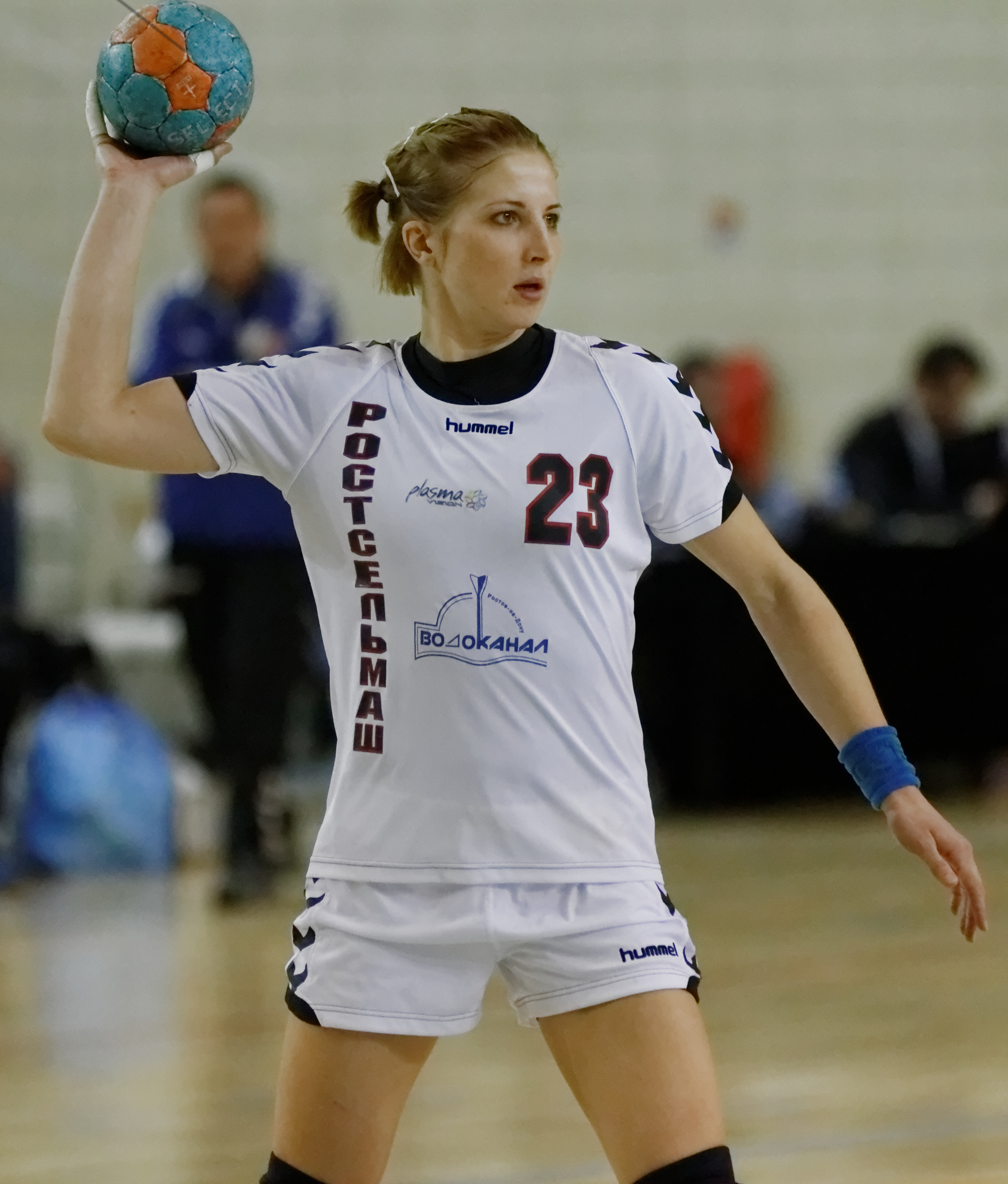 Регина Шимкуте, игрок ГК Ростов-Дон